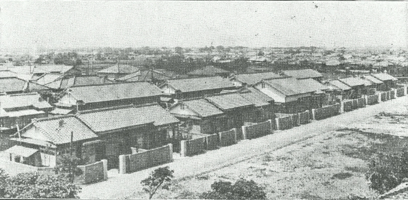 中文（台灣）: 臺北州軍人遺族住宅位於臺北市大安十二甲，於1939年3月完工，計有甲號住宅4棟8戶，乙號住宅5棟10戶。